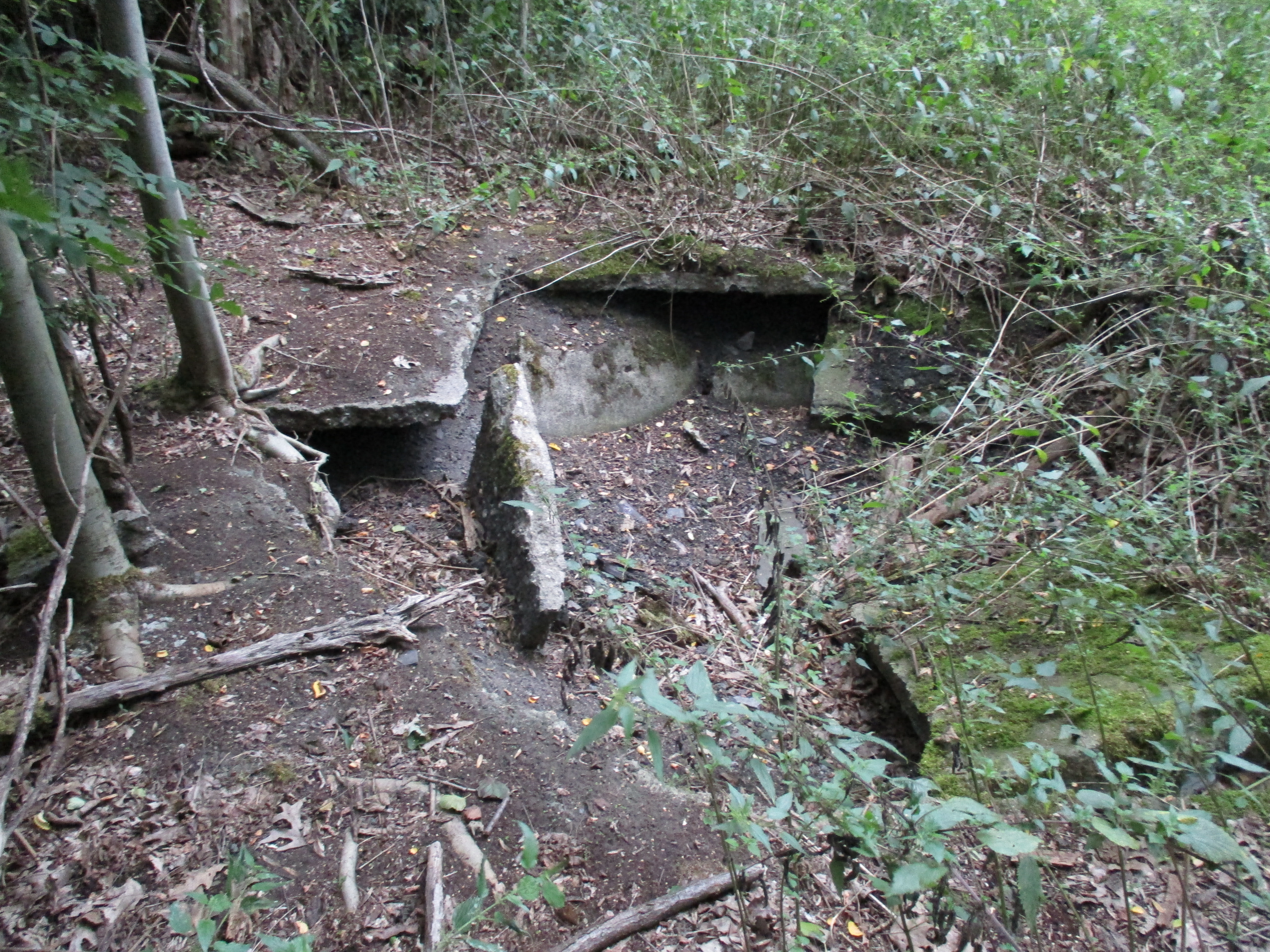 Panzerbau III war eine Rüstungsschmiede der Firma Krupp während dem 2. Weltkrieg in Essen-Borbeck. Dort wurden Zulieferteile für den Tigerpanzer gefertigt. Heute befindet sich auf der Fläche ein kleines Naherholungsgebiet. Hier und da entdeckt man heute noch Fundamentreste der ehemaligen Panzerfabrik.